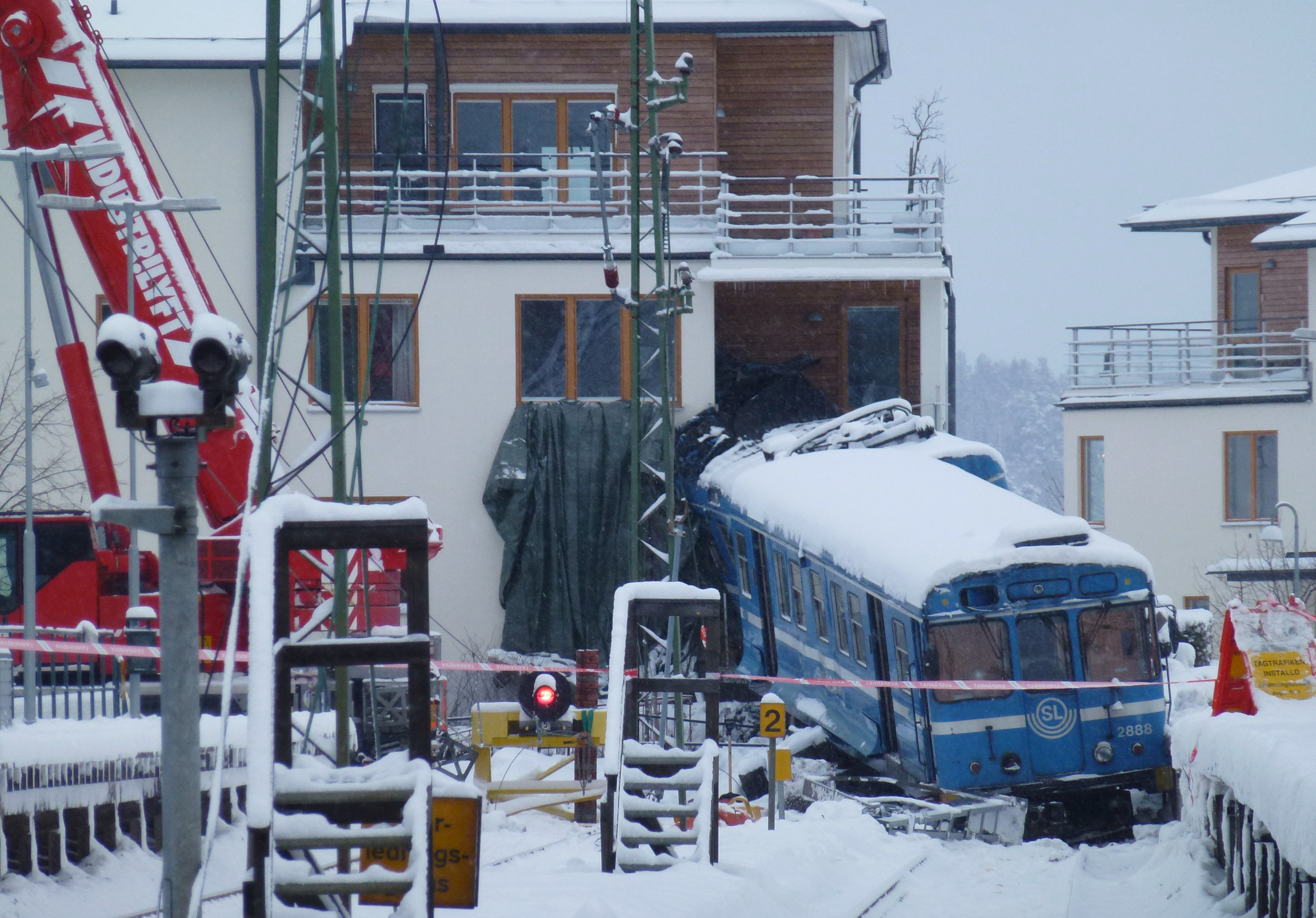 Saltsjöbadsolyckan den 15 januari 2013